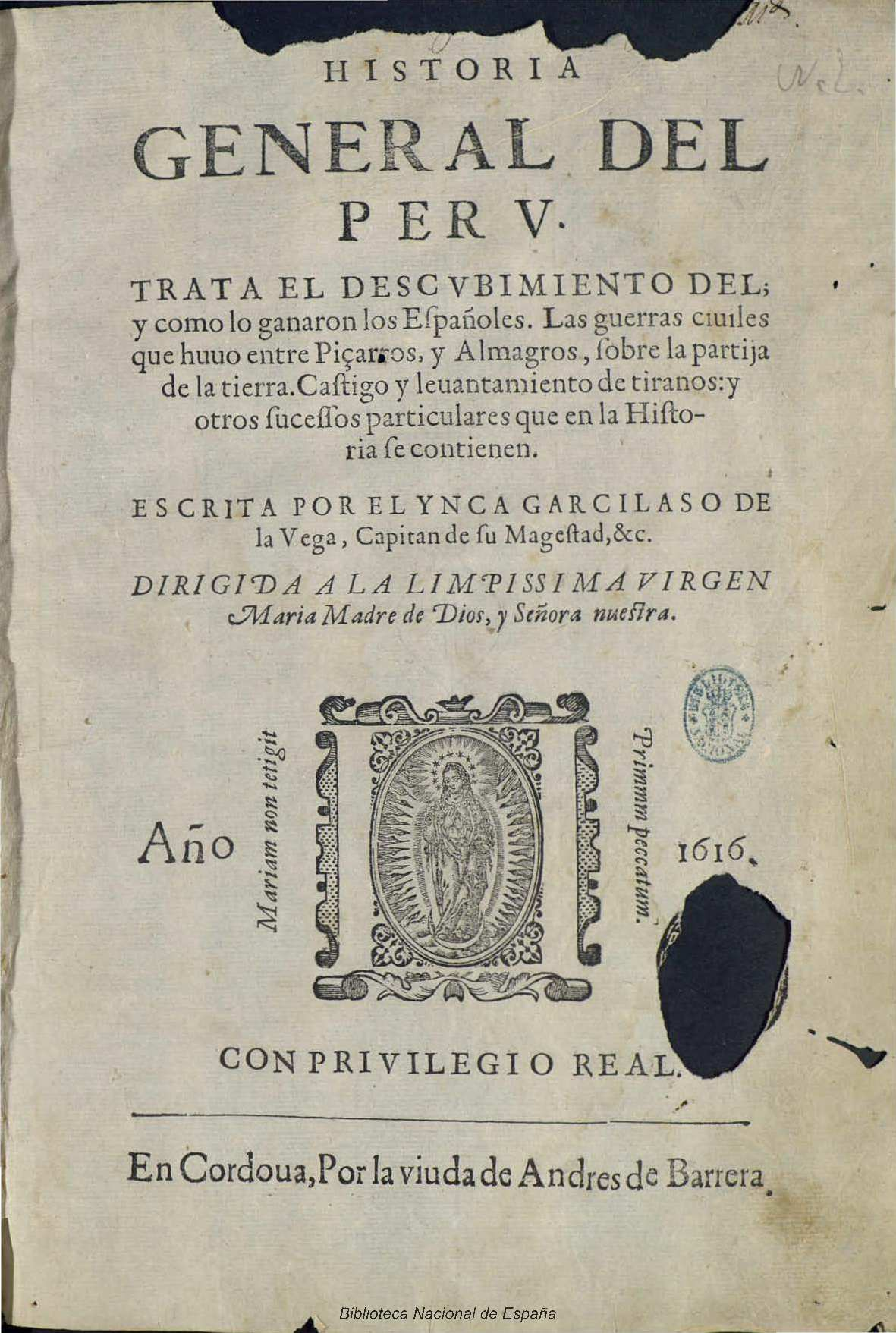 Historia general del Perú : trata el descubrimiento del, y como lo ganaron los españoles ... escrita por el Ynca Garcilaso de la Vega ... Autor: Garcilaso de la Vega, el Inca (1539-1616) Fecha: 1616 Datos de edición: En Cordoua, por la viuda de Andres de Barrera